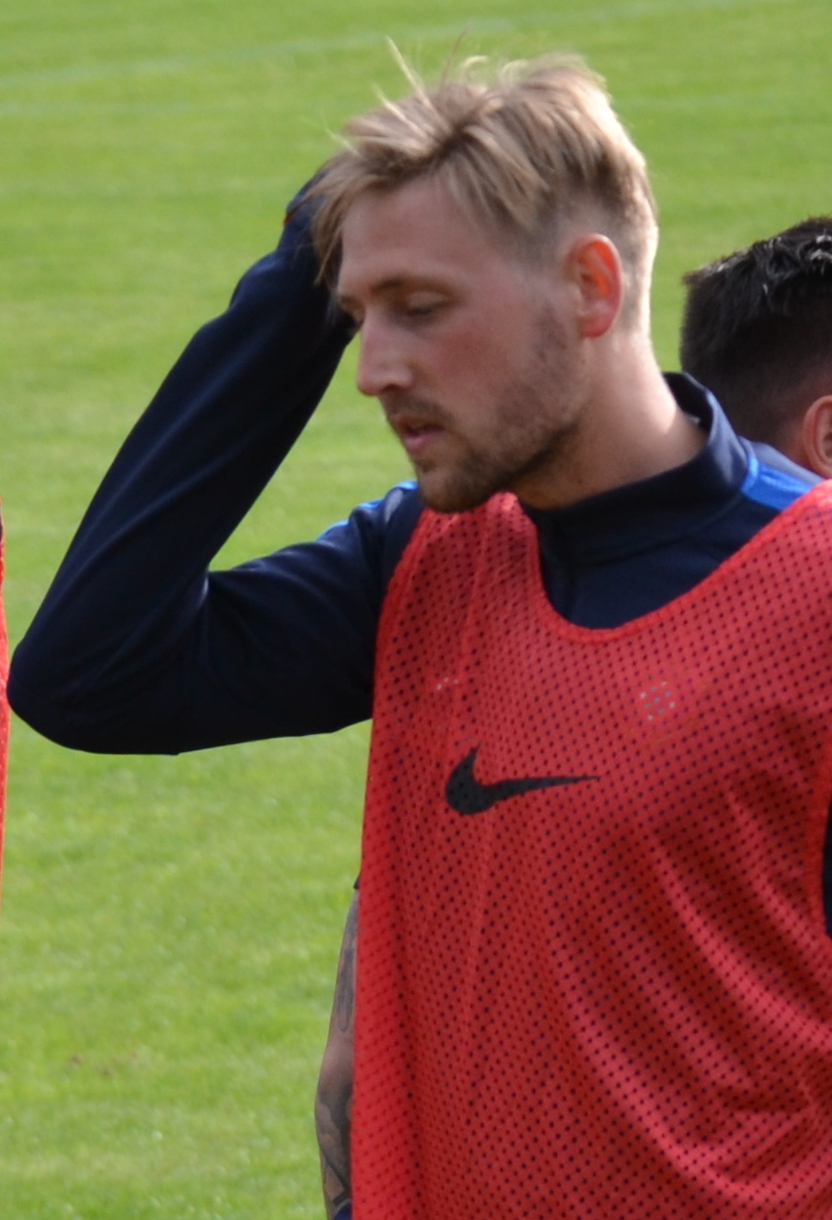 Björn Kluft beim Aufwärmen im Freundschaftsspiel von Erzgebirge Aue gegen den HFC Colditz im Juni 2016